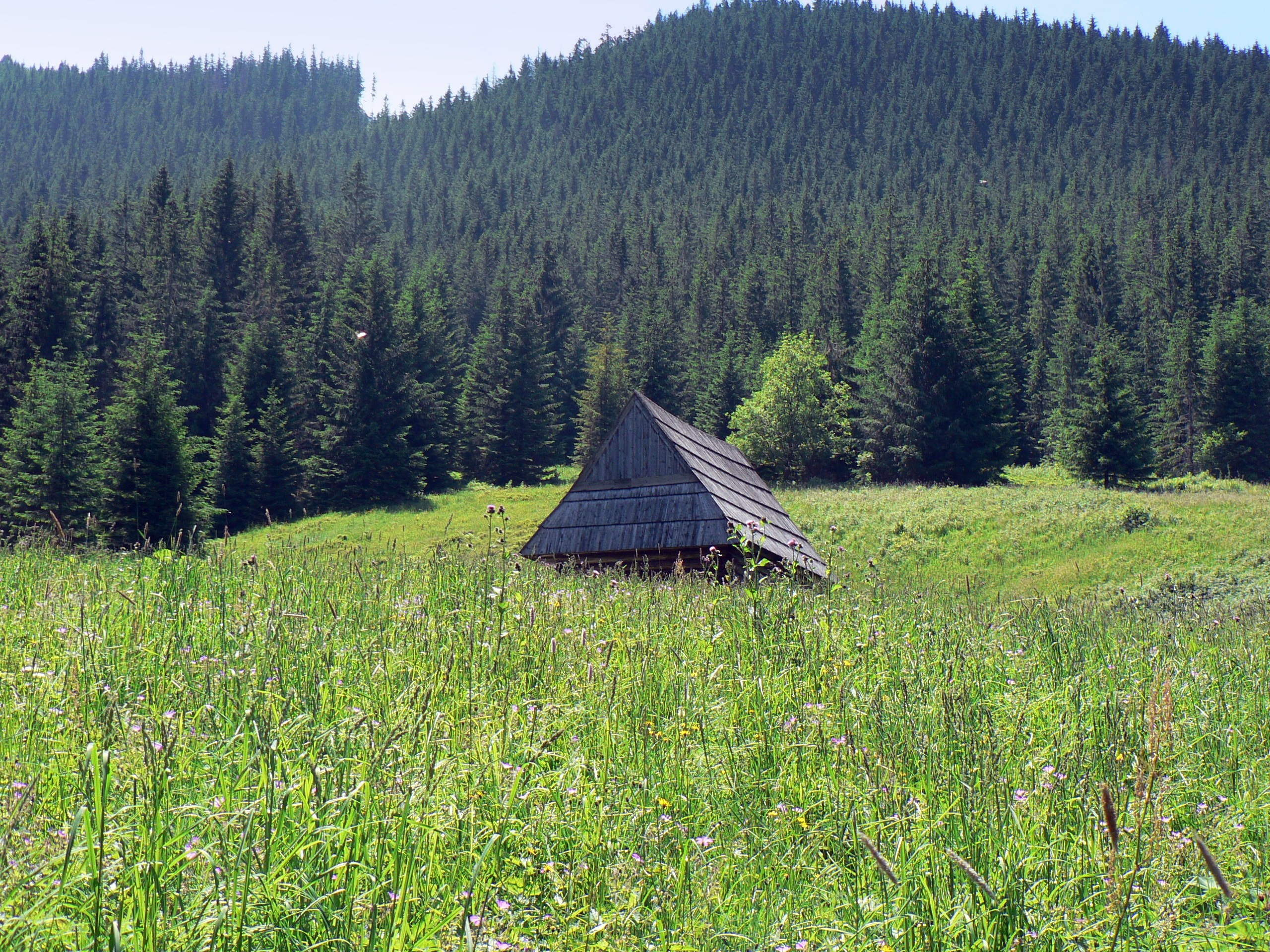 Polana Olczysko